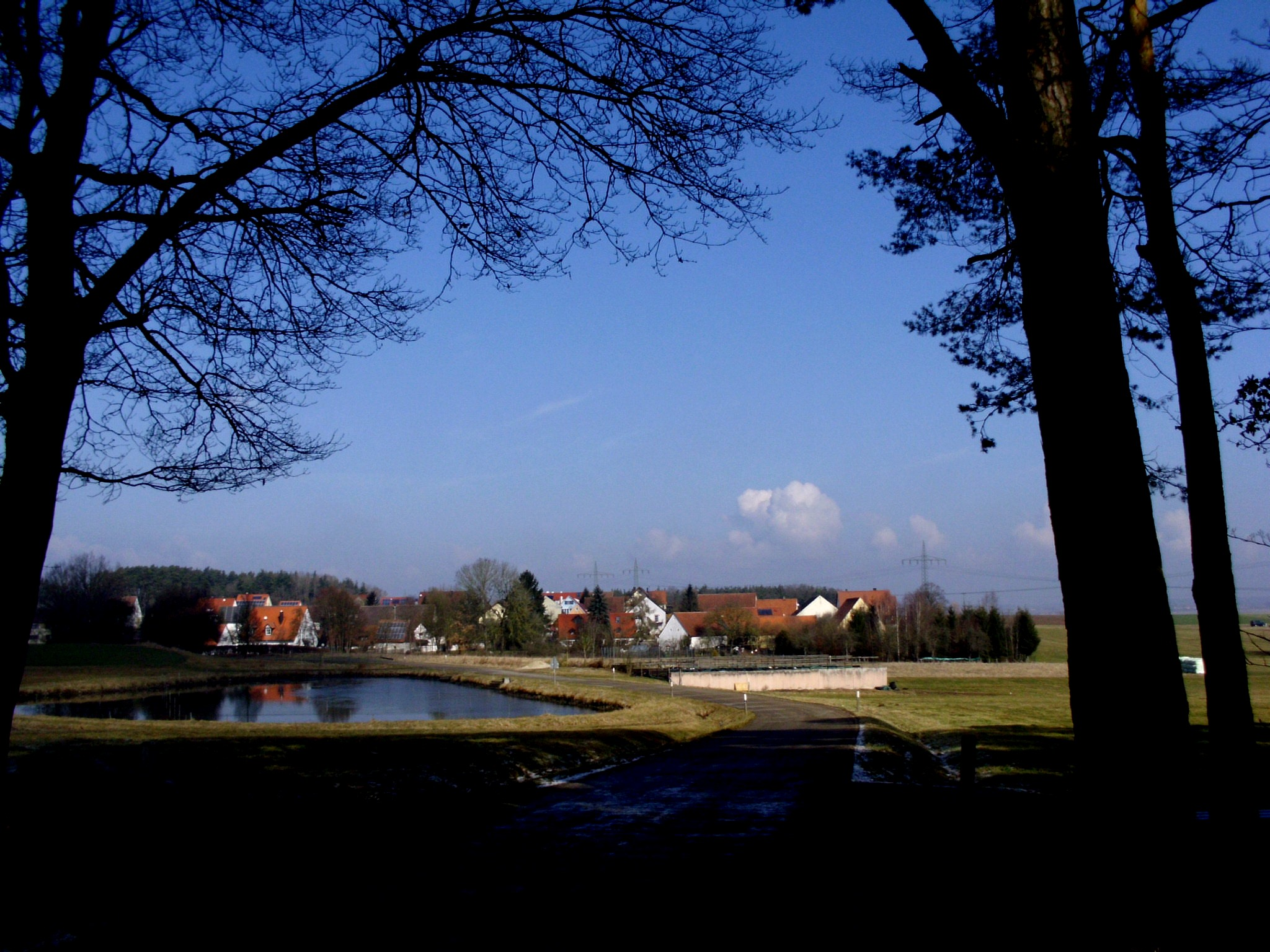 Höhberg, Gemeindeteil von Gunzenhausen im mittelfränkischen Landkreis Weißenburg-Gunzenhausen